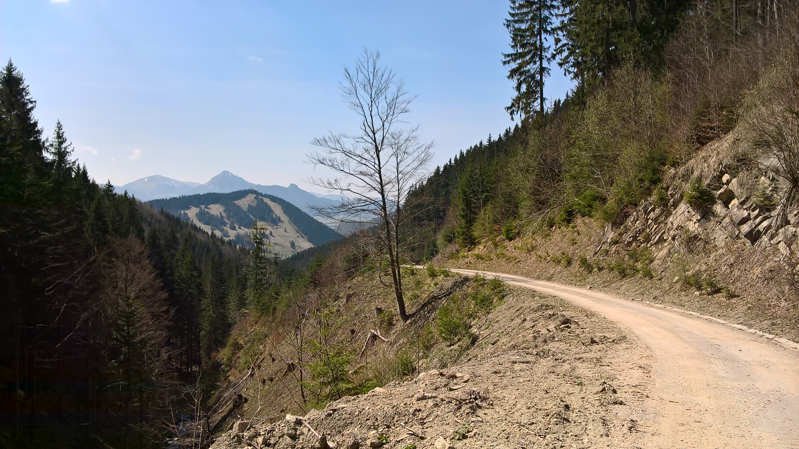 Widok na Koziniec oraz Mała Fatrę z Doliny Potoku Zazrivka